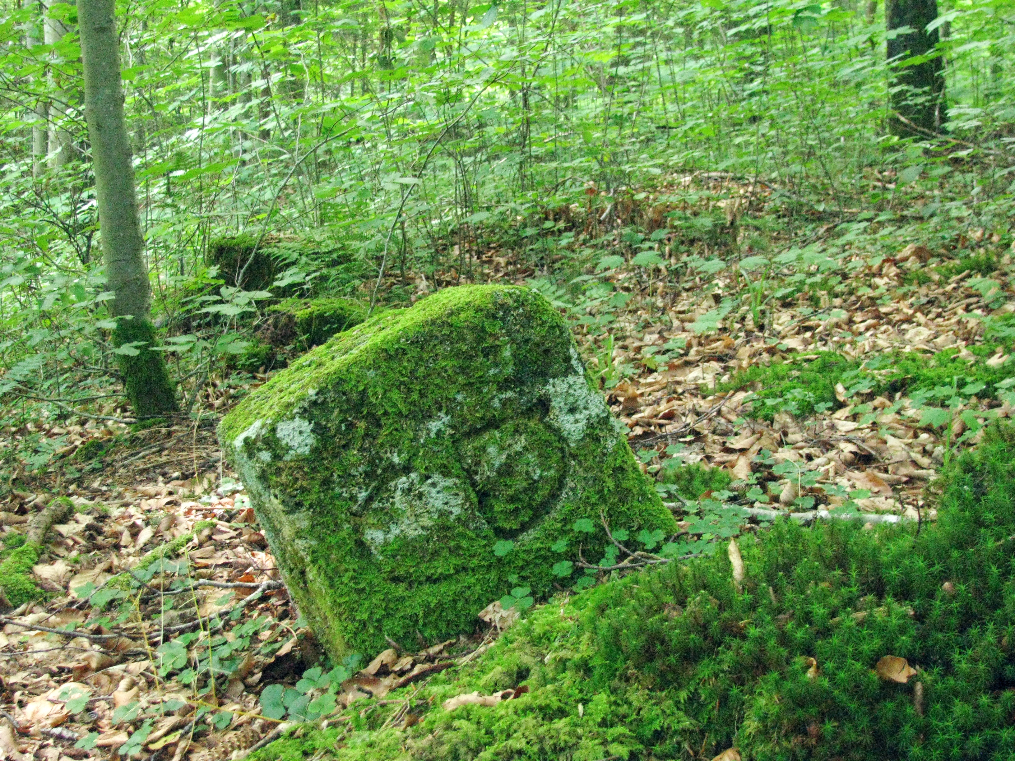 Östlichster von mehreren Grenzsteinen des ehemaligen Klosters Dießen im Forst Bayerdießen